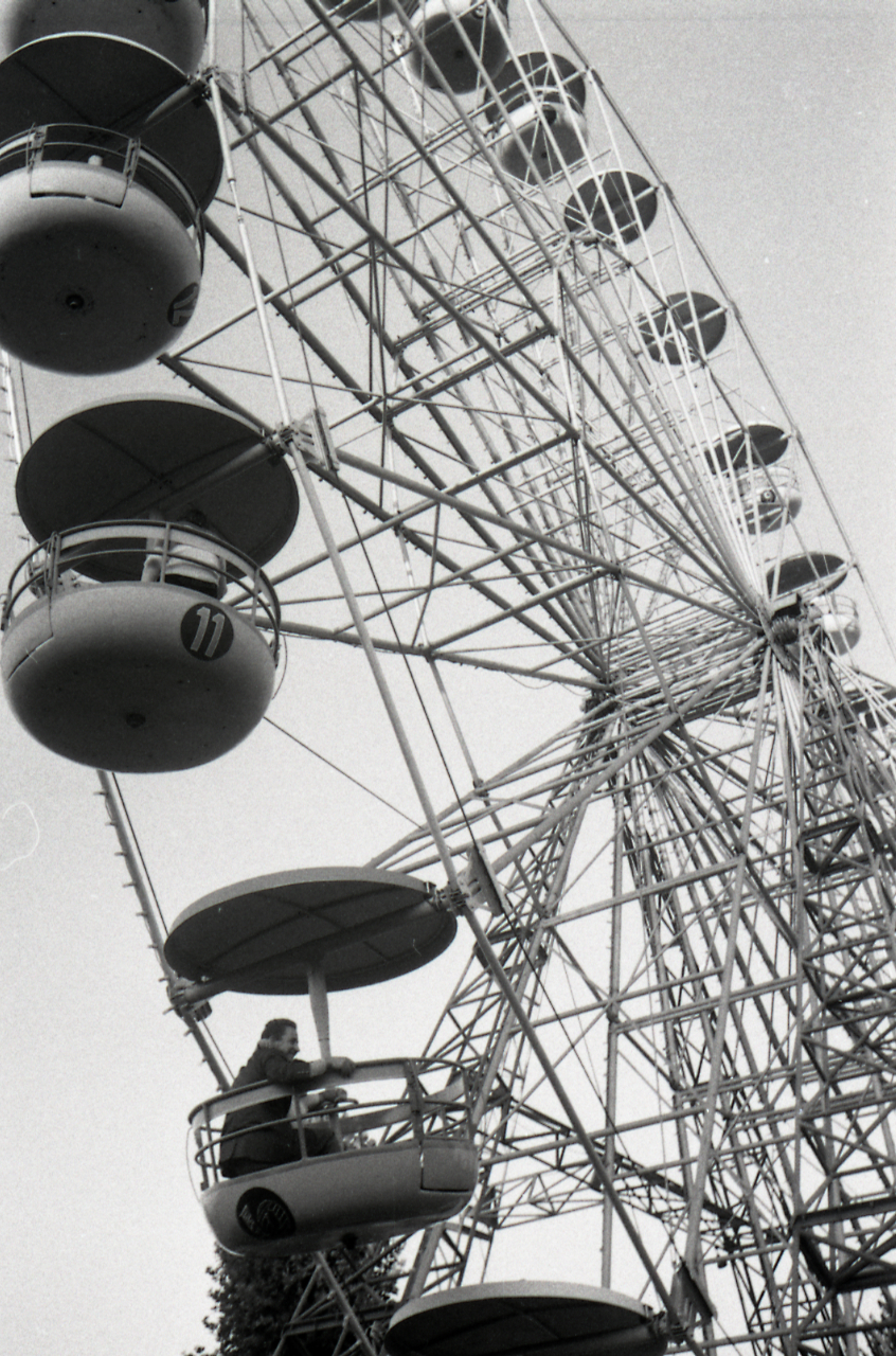 Servizio fotografico : Roma, 1967 / Paolo Monti. - Strisce: 7, Fotogrammi complessivi: 38 : Negativo b/n, gelatina bromuro d'argento/ pellicola ; 35 mm. - ((I fotogrammi hanno una doppia numerazione. . - Sul portanegativi: Leica M Tri-x. - Sul dorso del portanegativi Monti specifica: "ediz. Montanari - ord. Bestetti". - Occasione: Pubblicazione sconosciuta per Edizione Montanari a mezzo Bestetti. - Fonte: Agenda di Paolo Monti: Monti/ 3 aprile 1966 - 9 marzo 1971/ 12421-16823 (1966-1971), presso Archivio Paolo Monti